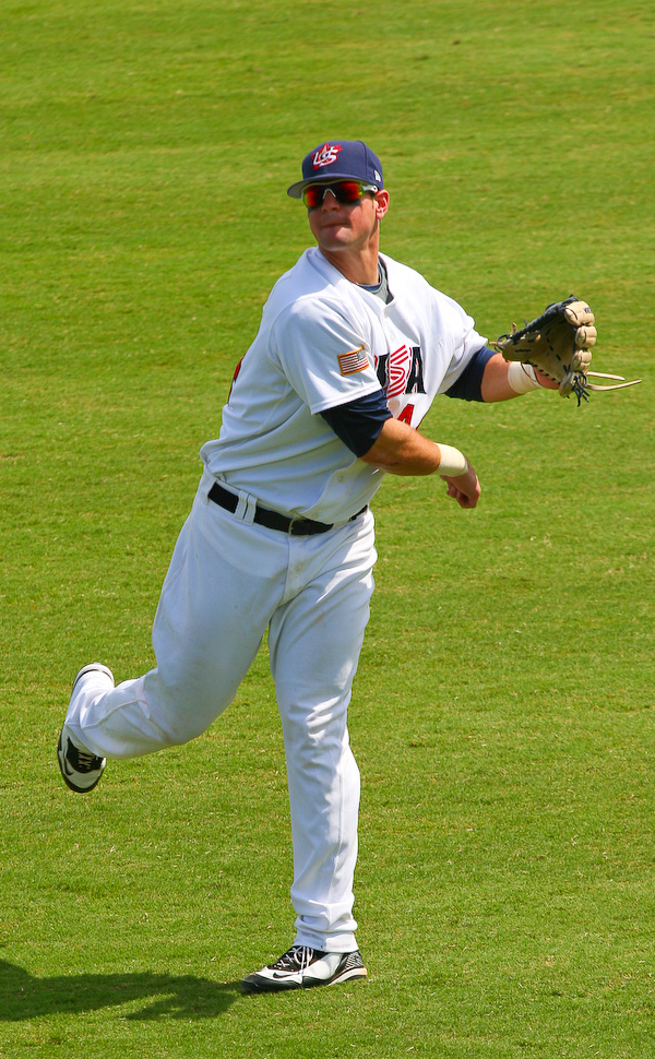 Matt LaPorta